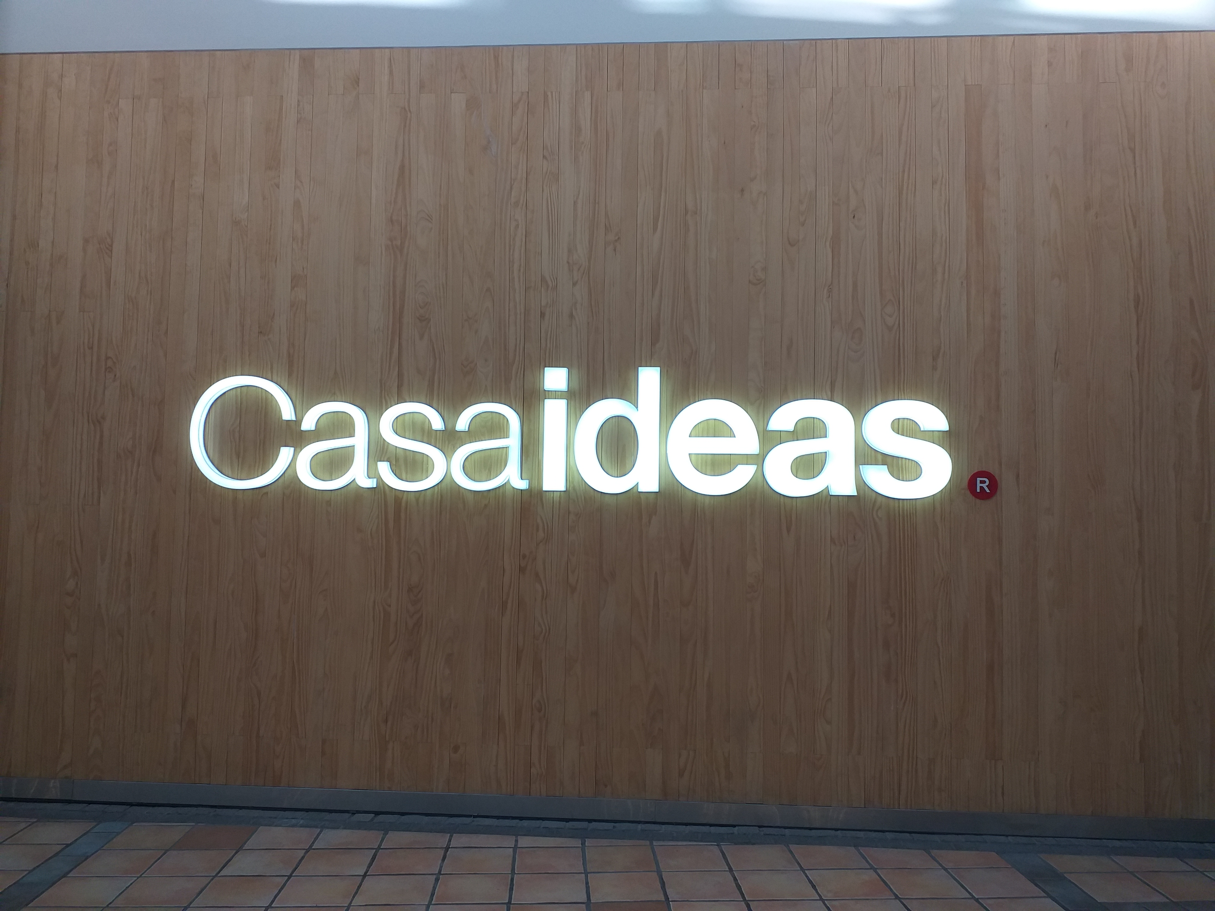 Frontis Casaideas Parque Arauco